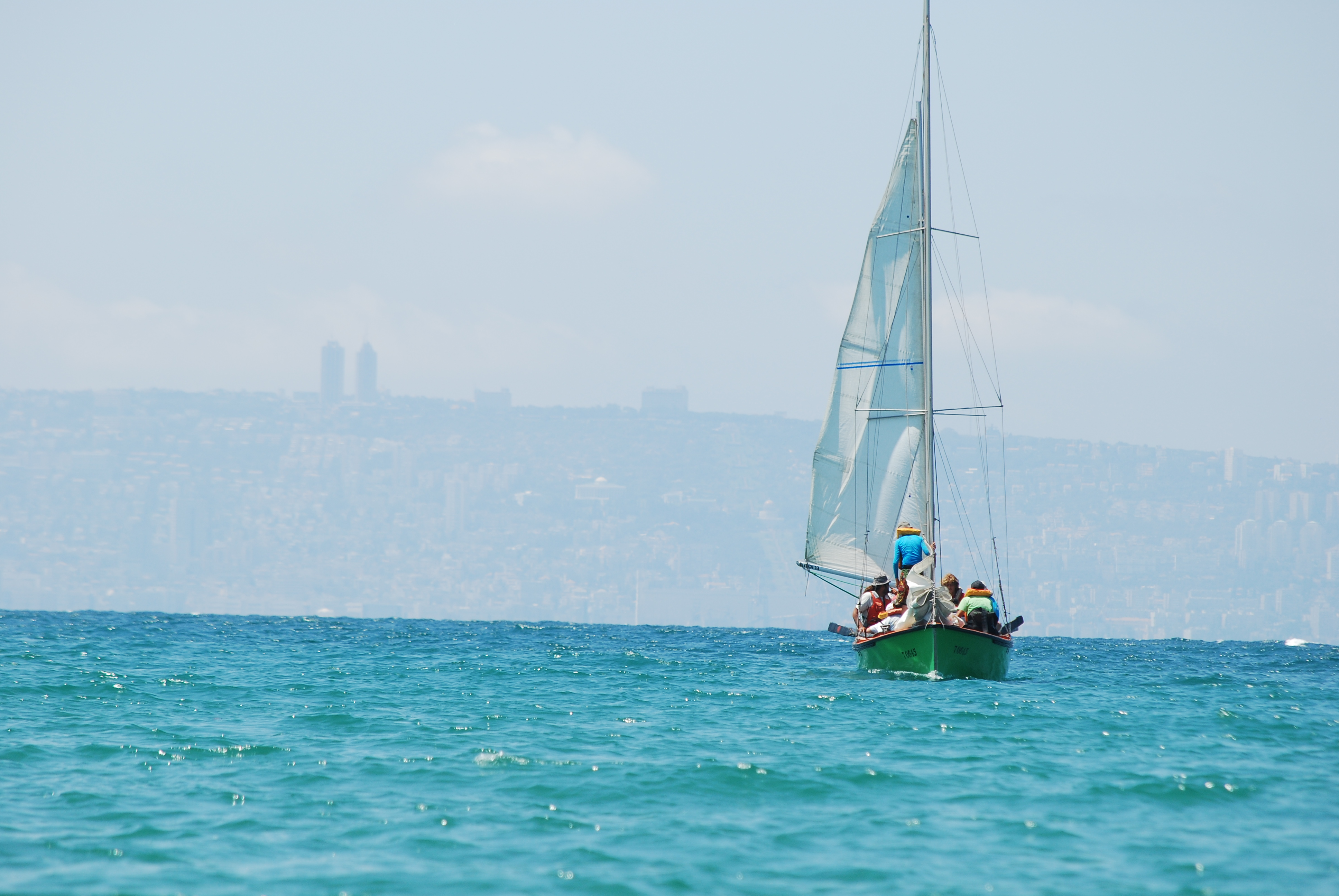 צופי ים בשייט ליד חיפה